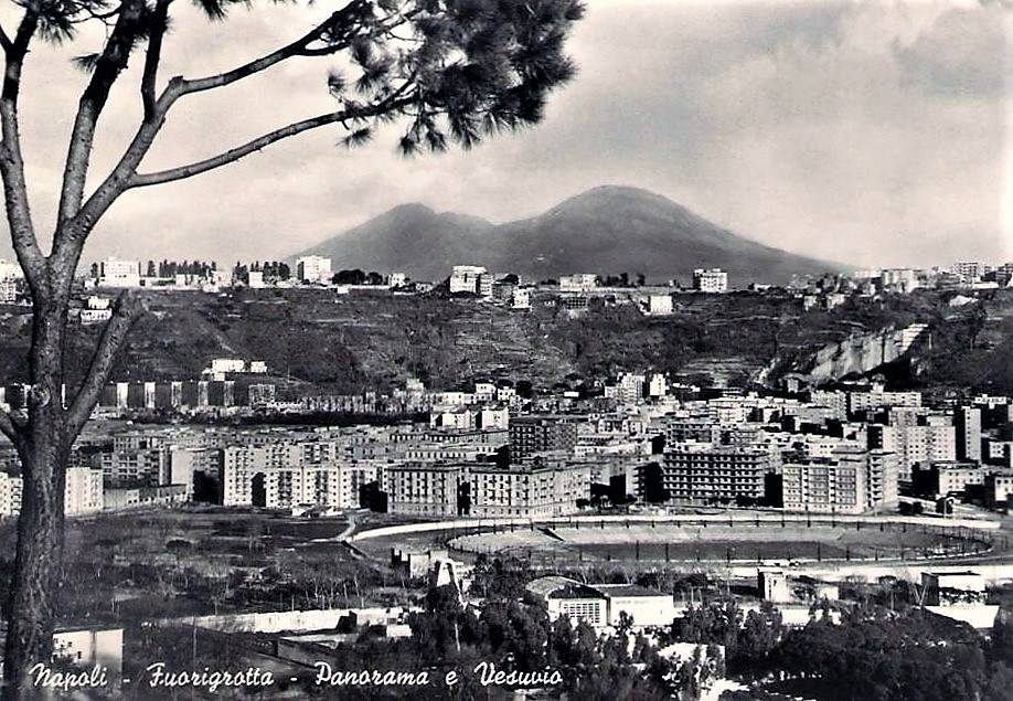 "Napoli - Fuorigrotta - Panorama e Vesuvio" con lo Stadio San Paolo agli albori (1953-1959). Cartolina. Autore sconosciuto.